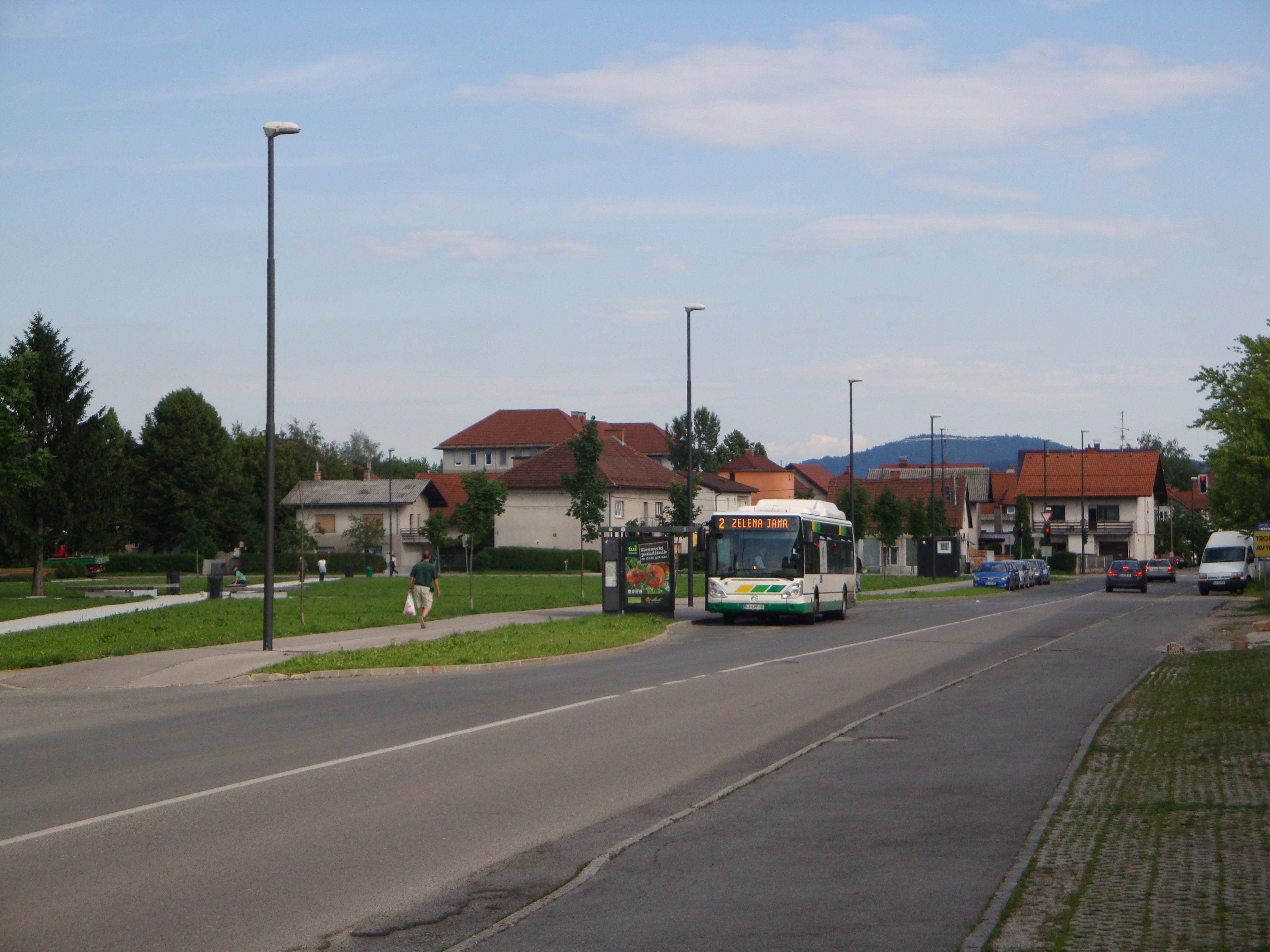 Zelena jama, Flajšmanova ulica, Ljubljana.